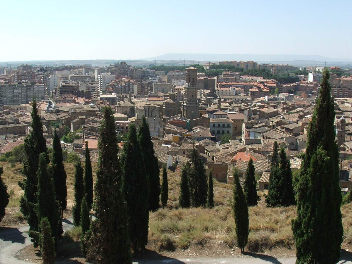 City of Tudela, Spain, General View, Ville de Tudela, Espagne, Vue generale